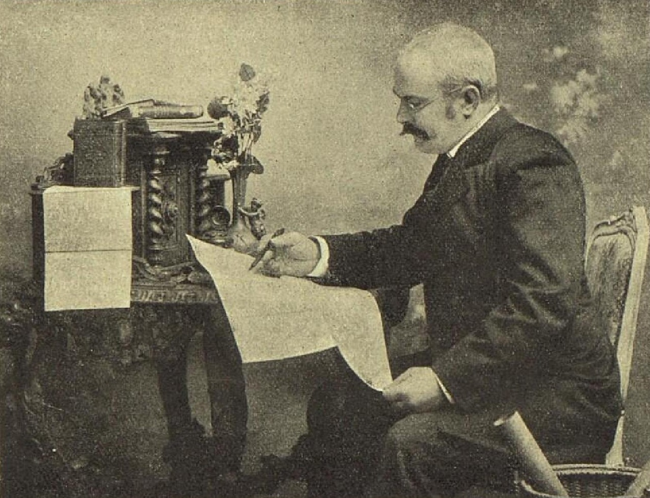 Hanuš Kuffner, český novinář, spisovatel a vojenský historik